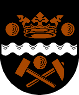 Gemeinde Unternberg: In schwarzem Schild ein schmaler silberner Wellenbalken, begleitet oben von einer goldenen Krone, rechts und links davon je eine goldene Kugel, unten von den gekreuzten goldenen Schlägel und Eisen, beide oben eine goldene Kugel einschließend